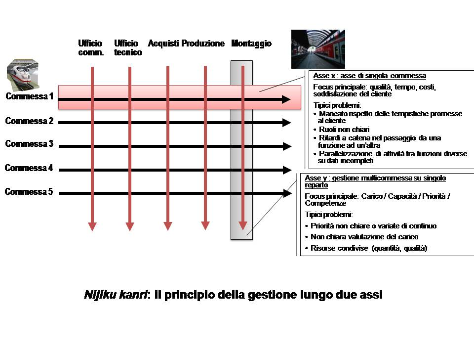 Nijiku kanri: the two directions the Setsuban Kanri technique applies